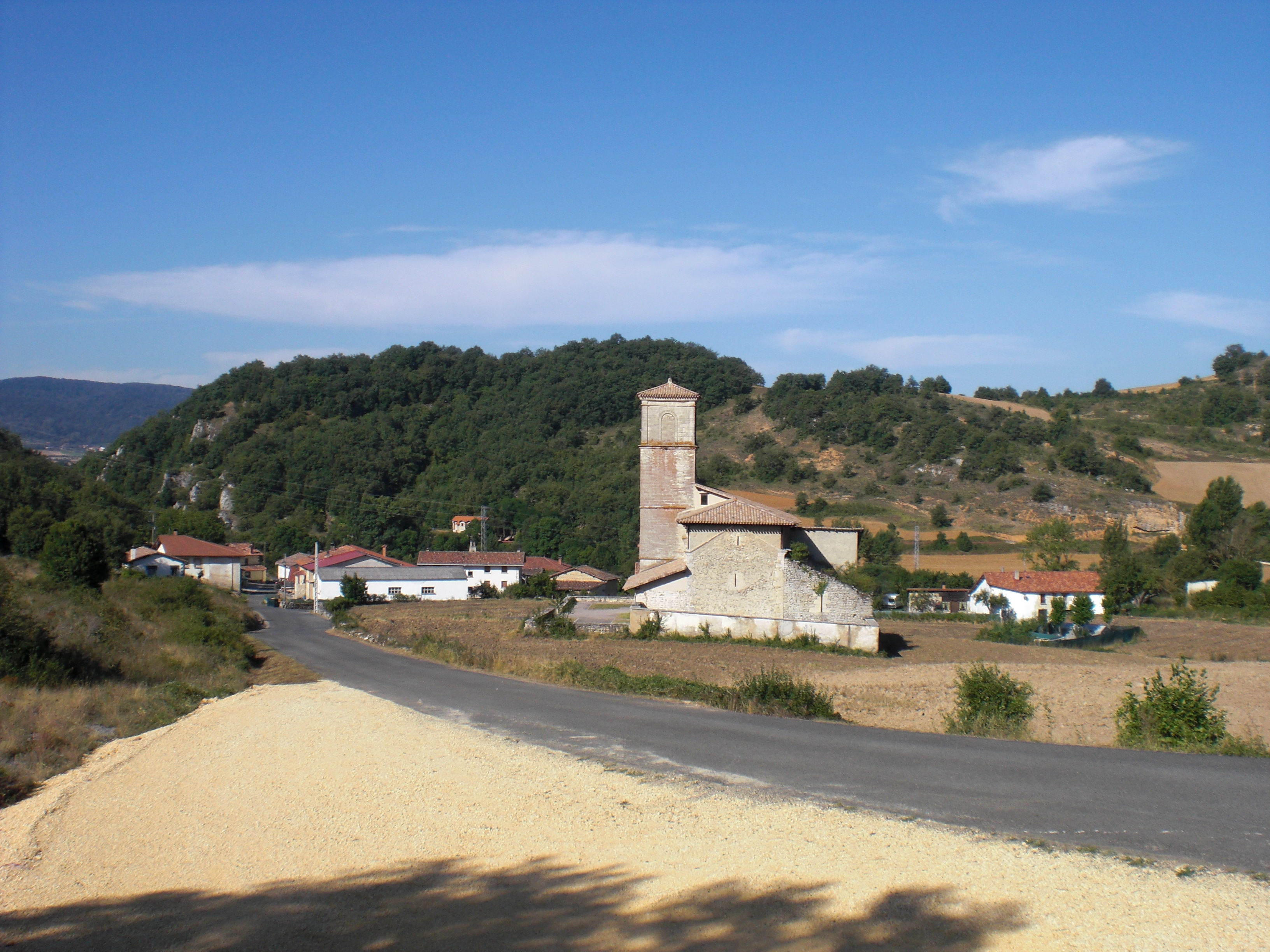 Zekuianoko ikuspegia